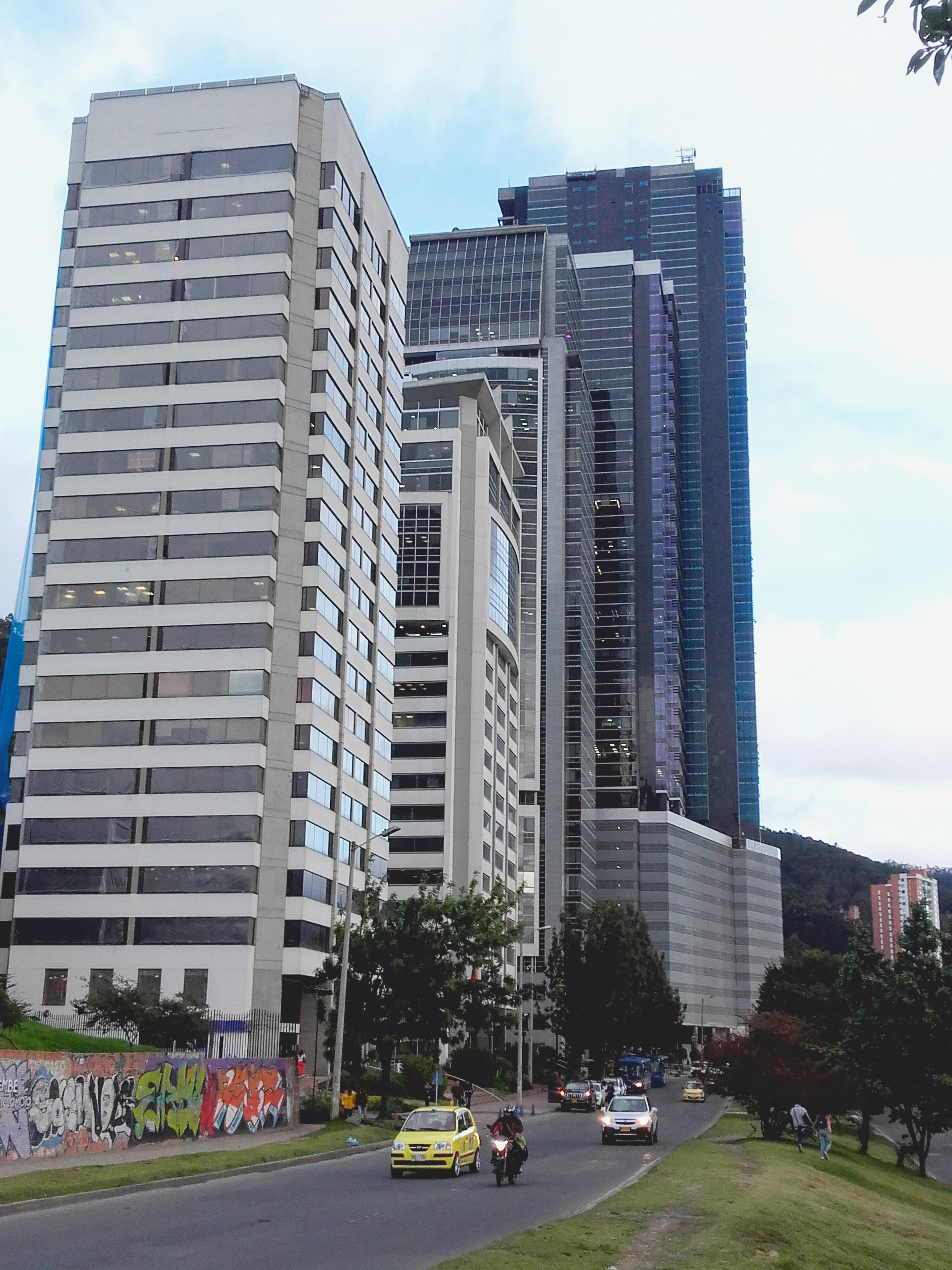 fndjfnfjfjfjjfjfjfjfhhj